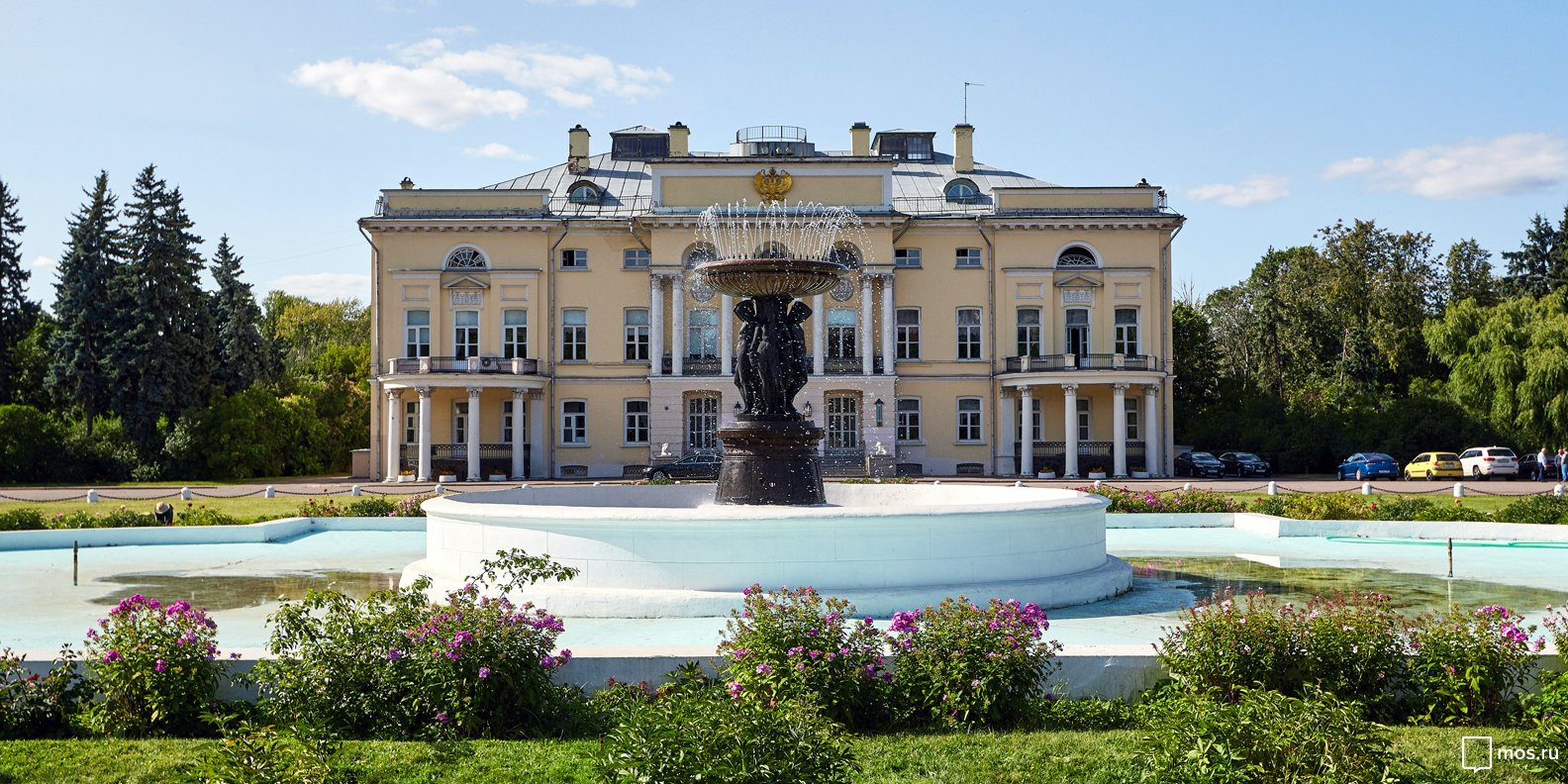 Николький фонтан в Нескучном саду